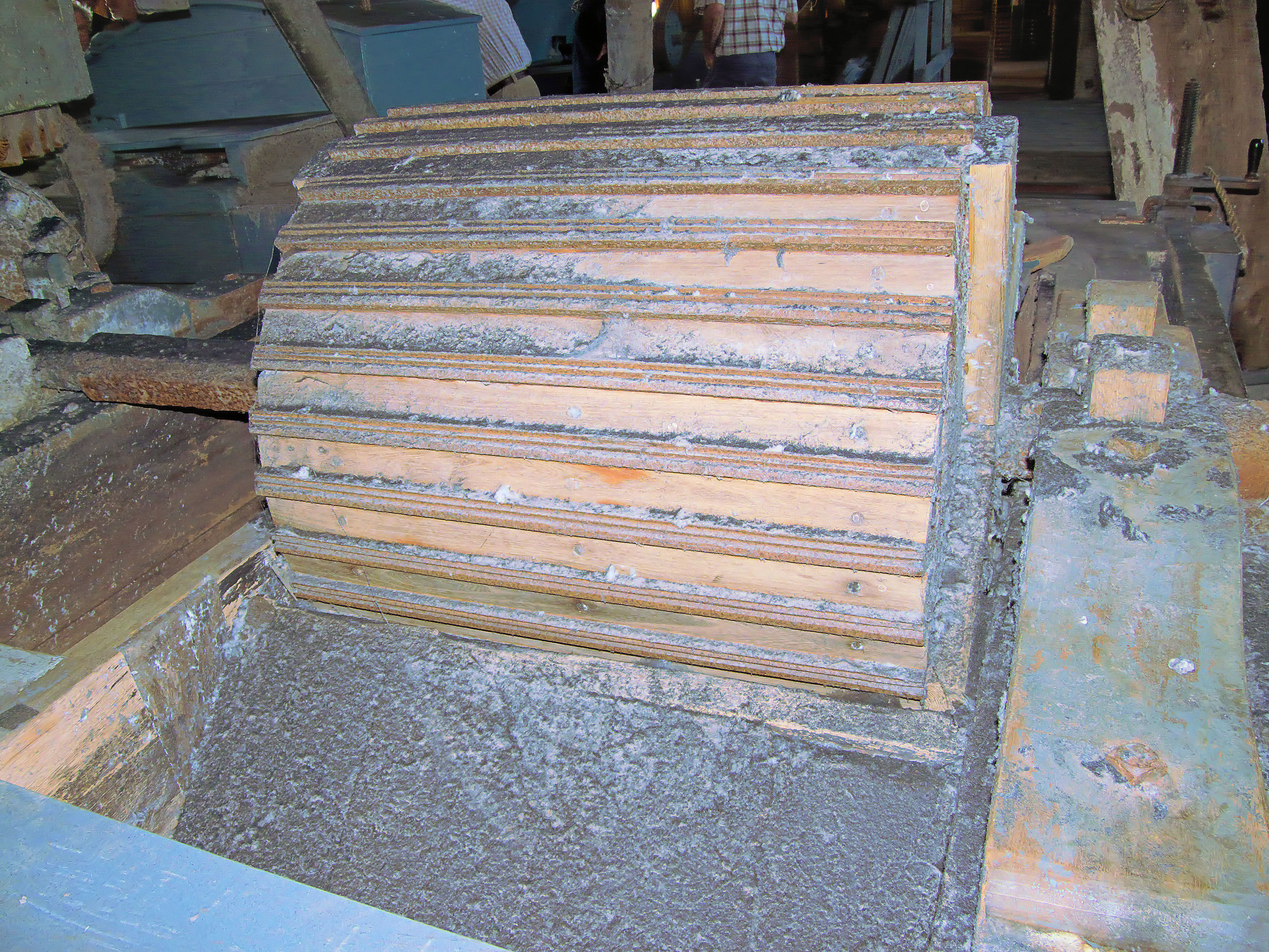 De Schoolmeester maalrol